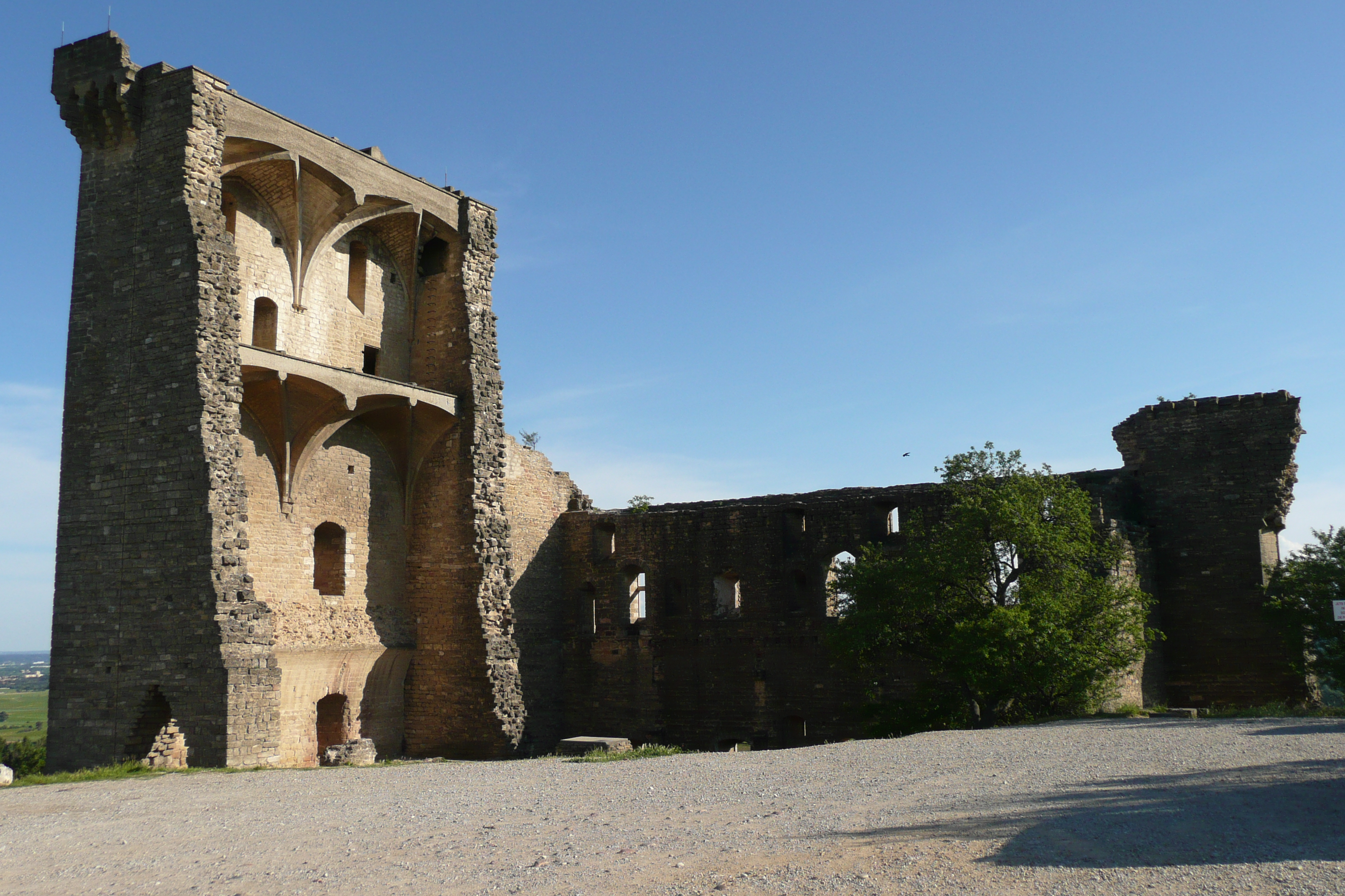 Château à Châteauneuf-du-Pape.